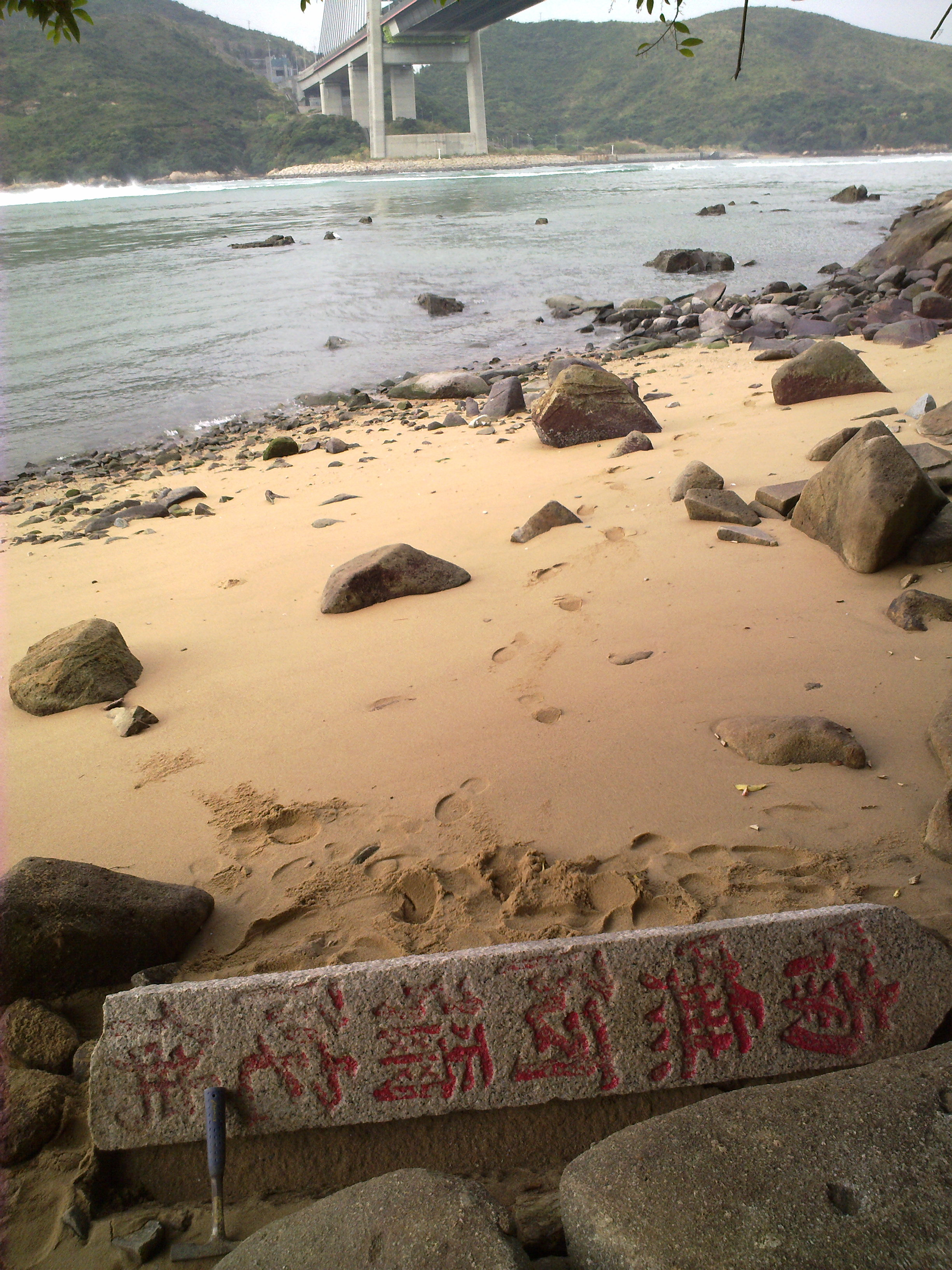 中文（香港）: 鎮流碑_龍蝦灣